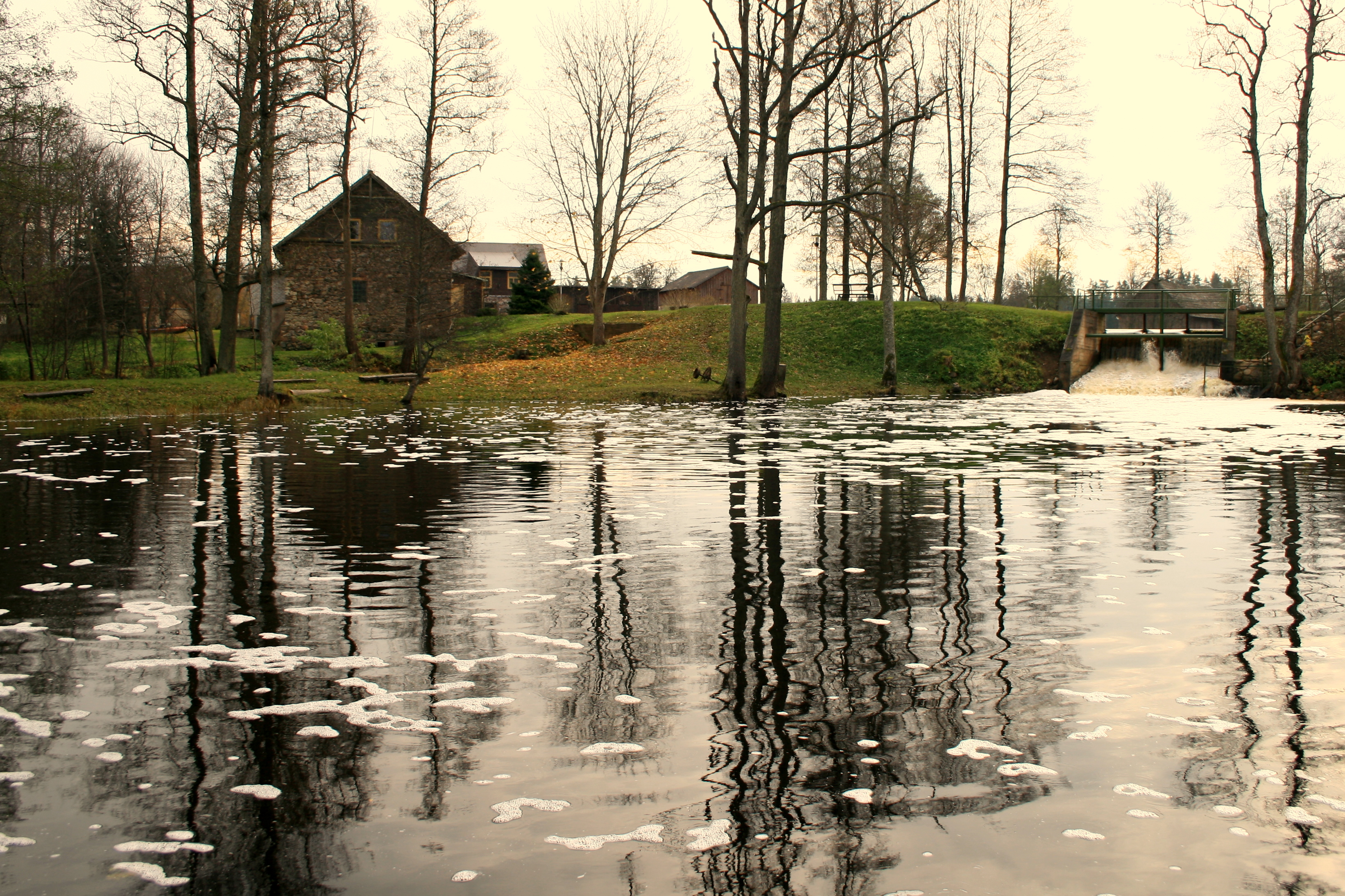 Uguņciema dzirnavas / mill